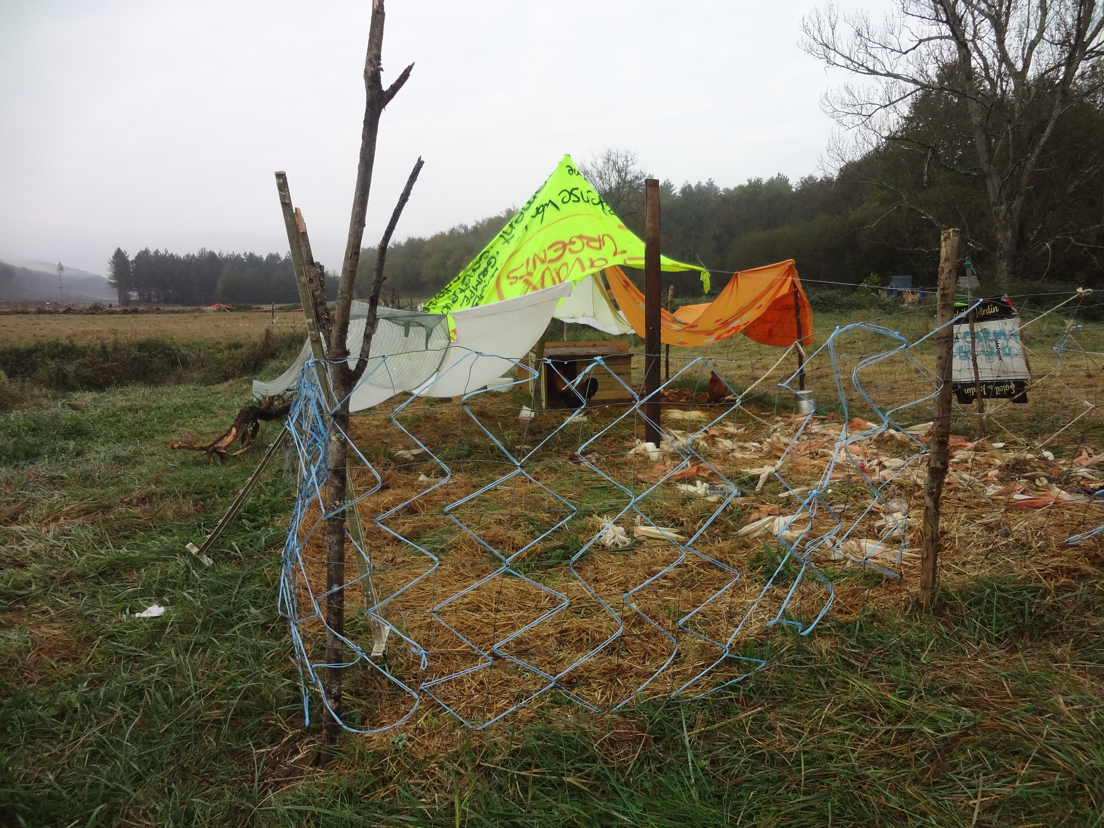 Poulailler de la Métairie neuve